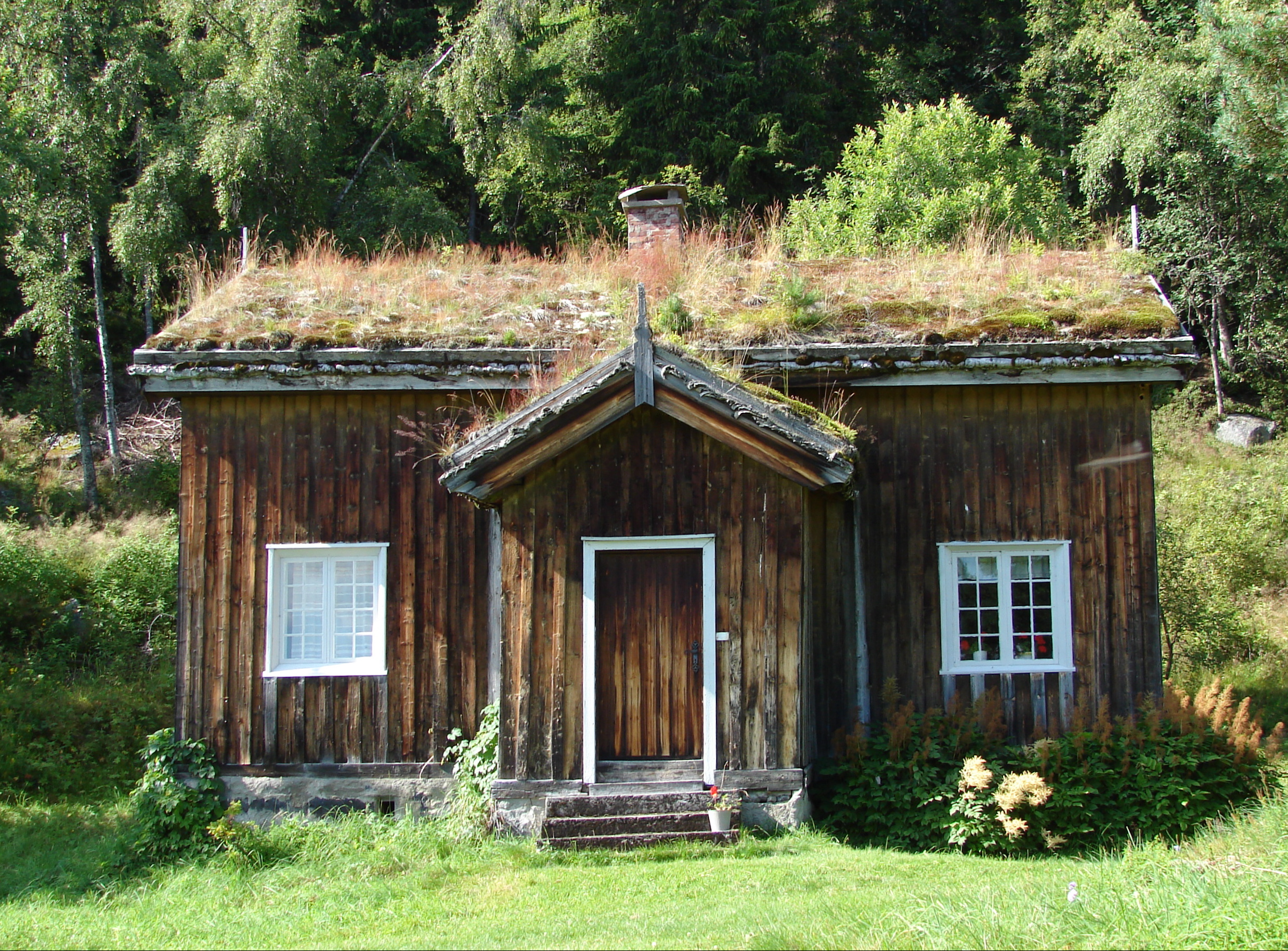 Fra Grimdalstunet i Telemark, bygningen hvor billedhuggeren Anne Grimdalen voksede op